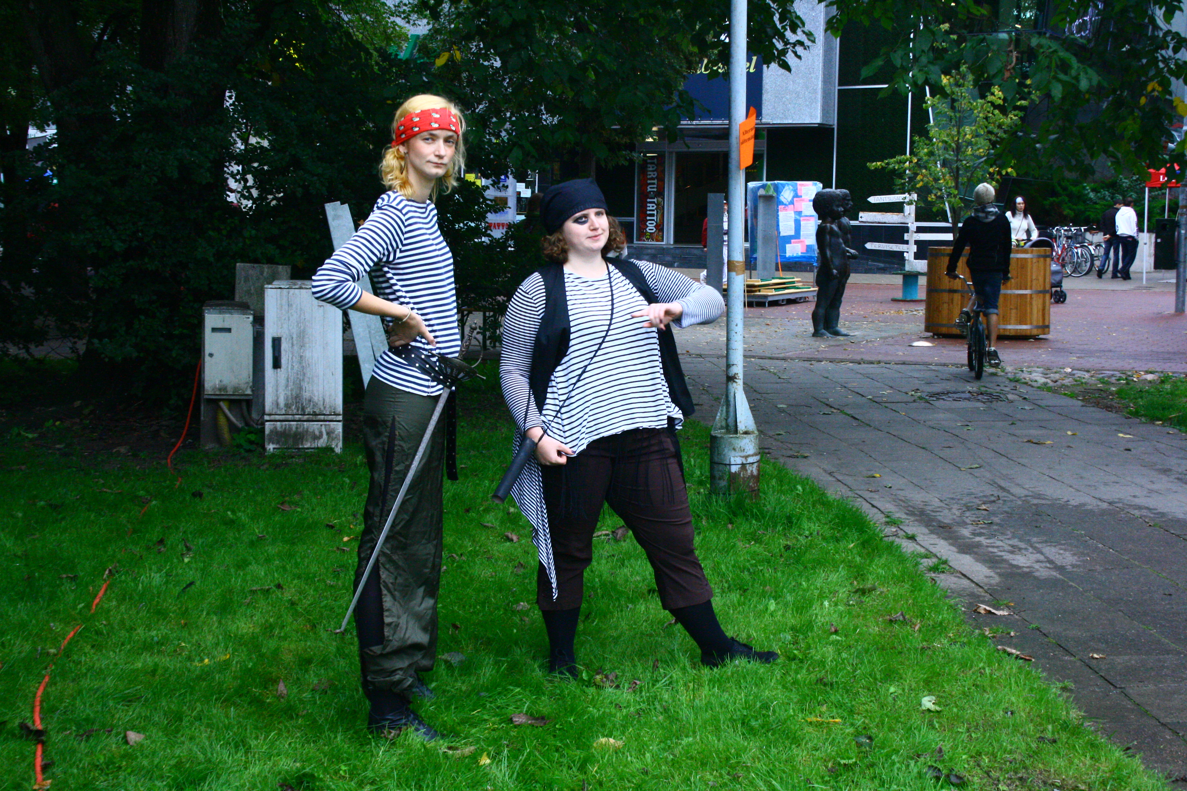 Piraadiõpituba